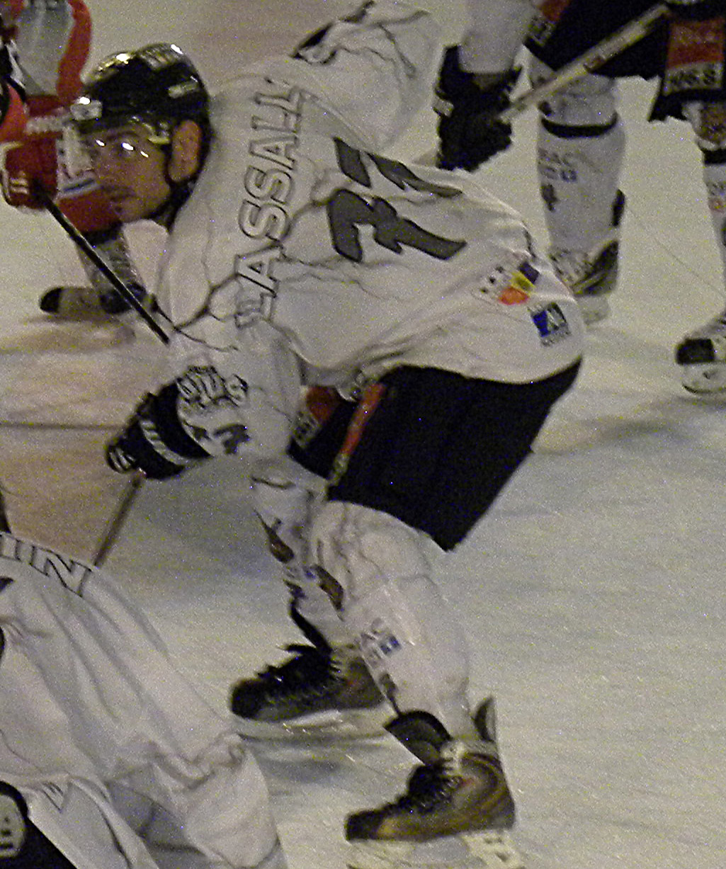 Xavier Lassale en 2012